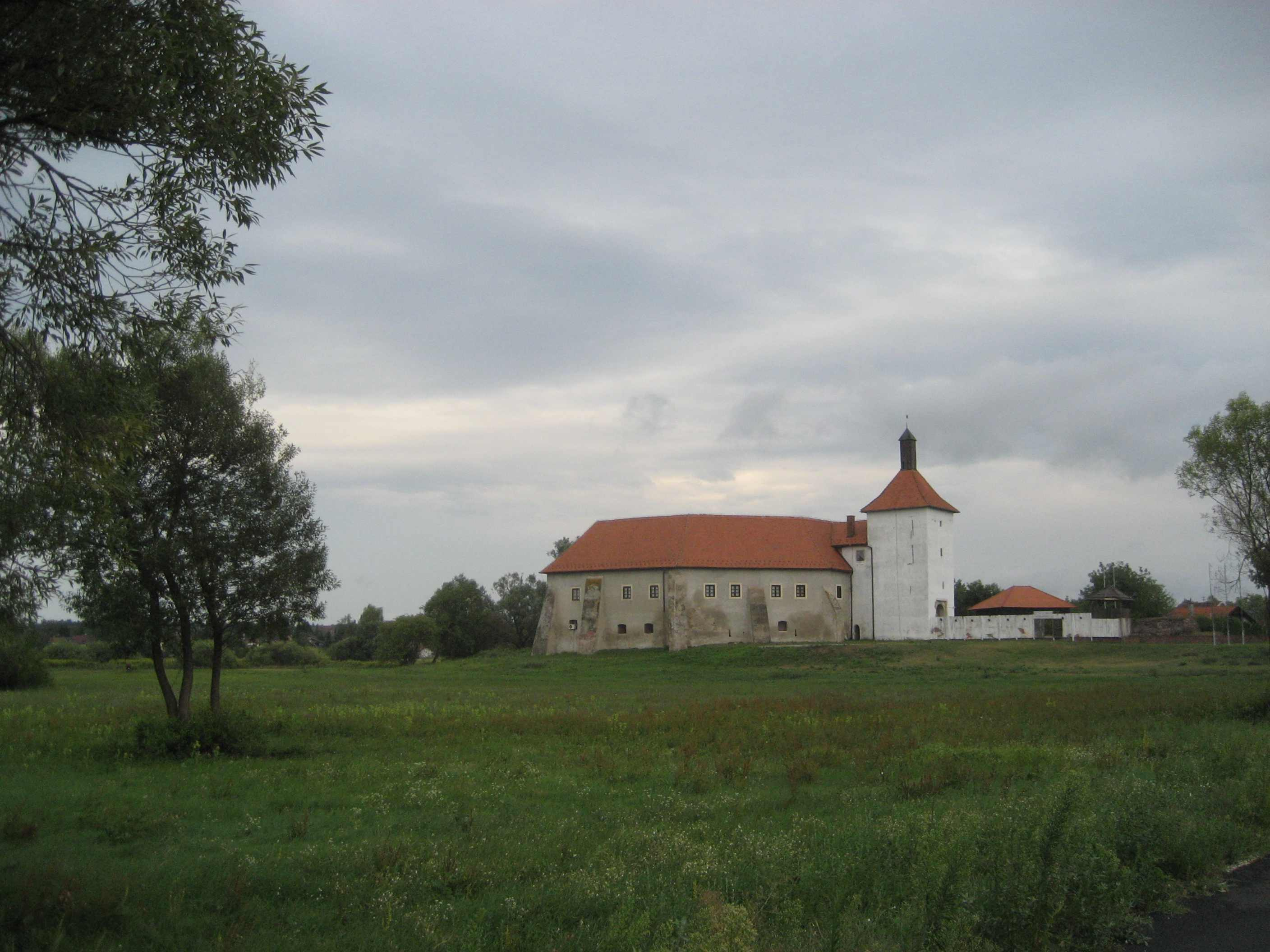 Djurdjevac Castle, Croatia